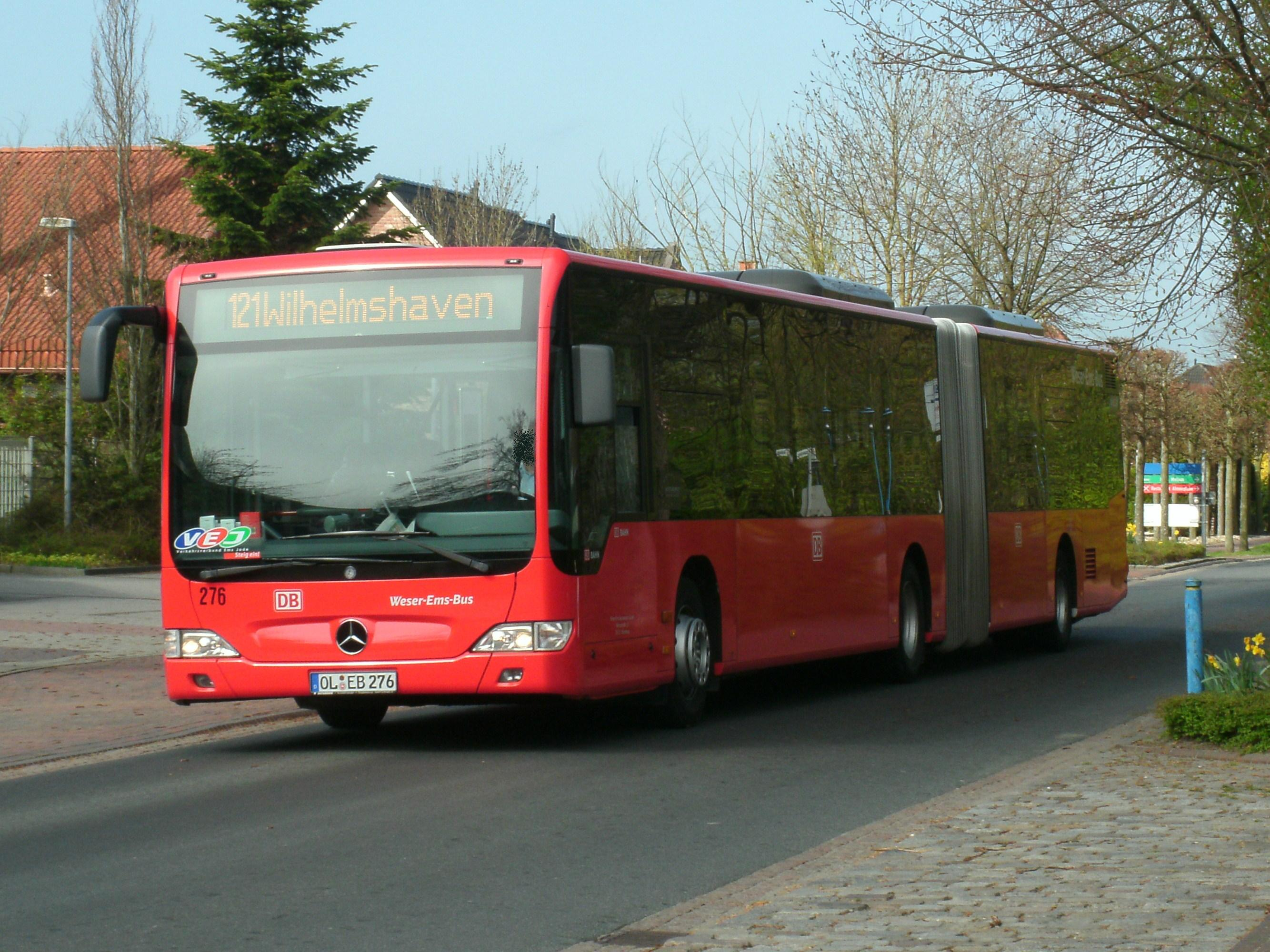 Linienbus der Weser-Ems-Busverkehr in Horumersiel, Rudolf-Garlichs-Straße